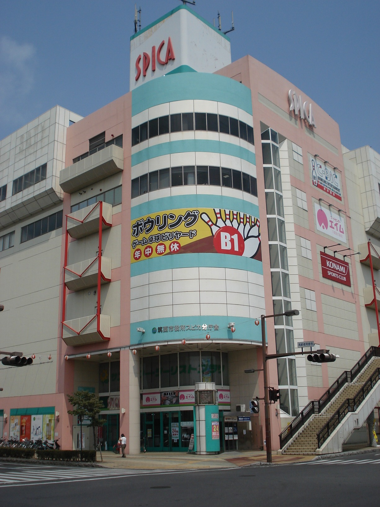 茨城県筑西市 下館駅前 下館SPICA